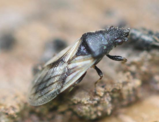 Wanze Metopoplax ditomoides während der Überwinterung am 14. Januar 2020 unter einem Rindenstück einer Platane in Walldorf/Baden